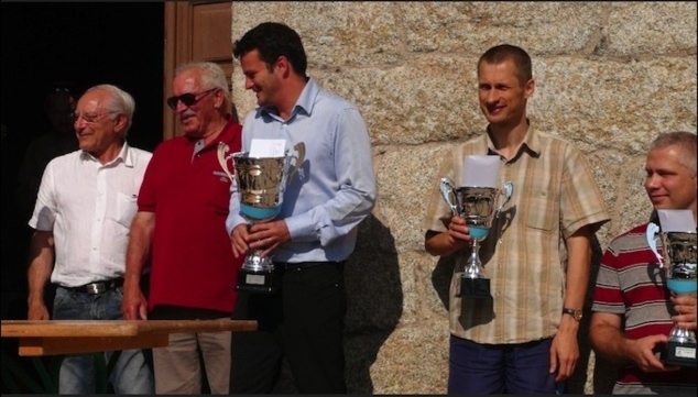 Etienne Bacrot remportant la 3e édition du tournoi de Quenza